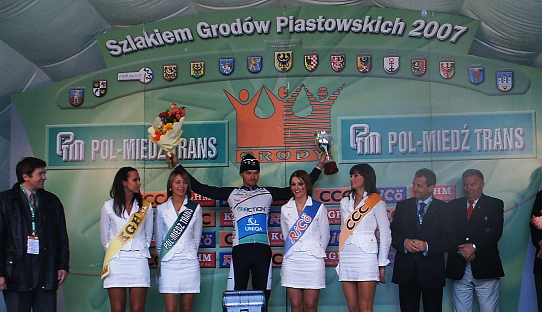 Robert Radosz podczas dekoracji zwycięzcy 4 etapu 42. wyścigu kolarskiego Grody Piastowskie